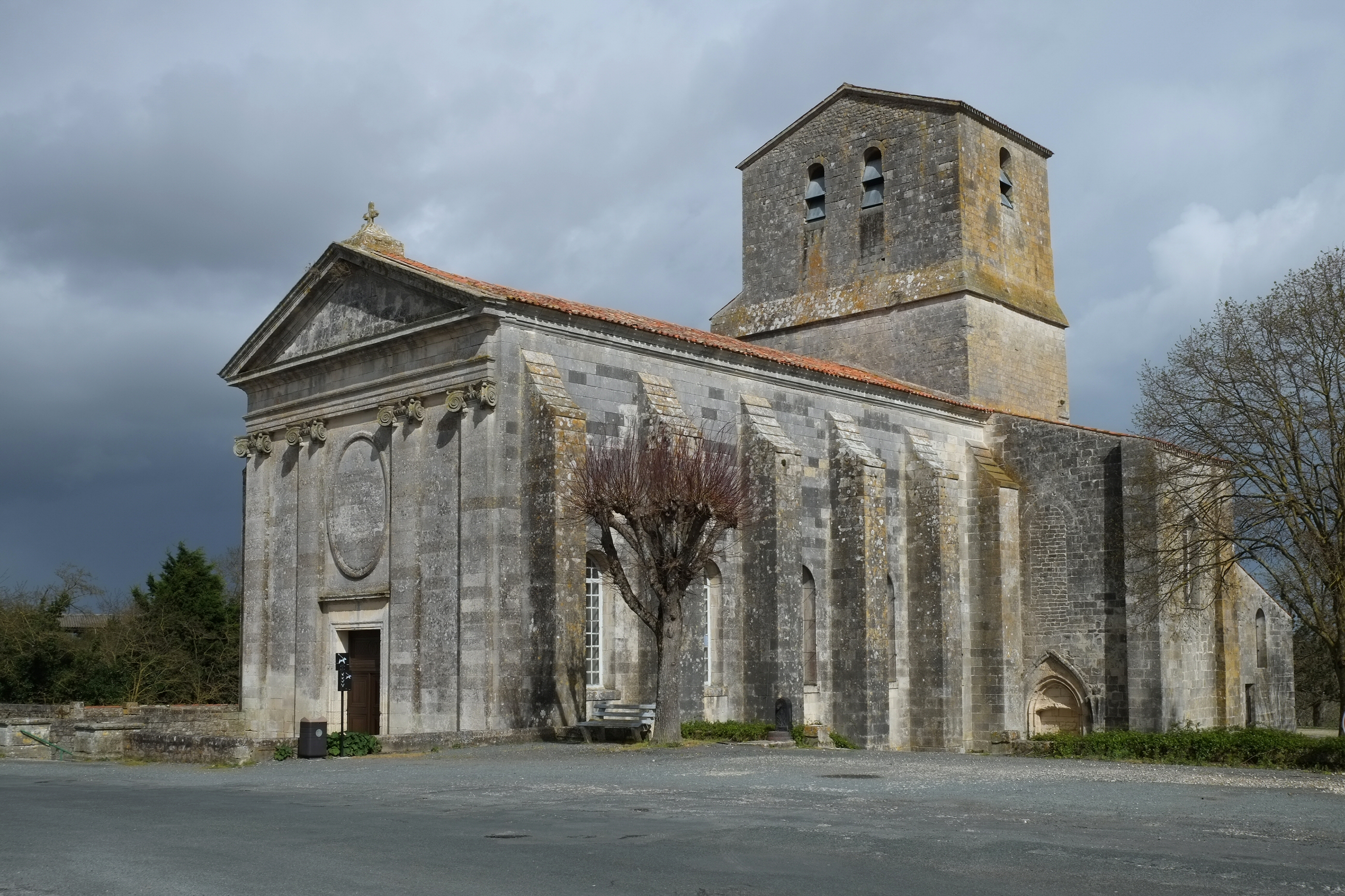 Église Saint-Pierre Soubise Charente-Maritime France